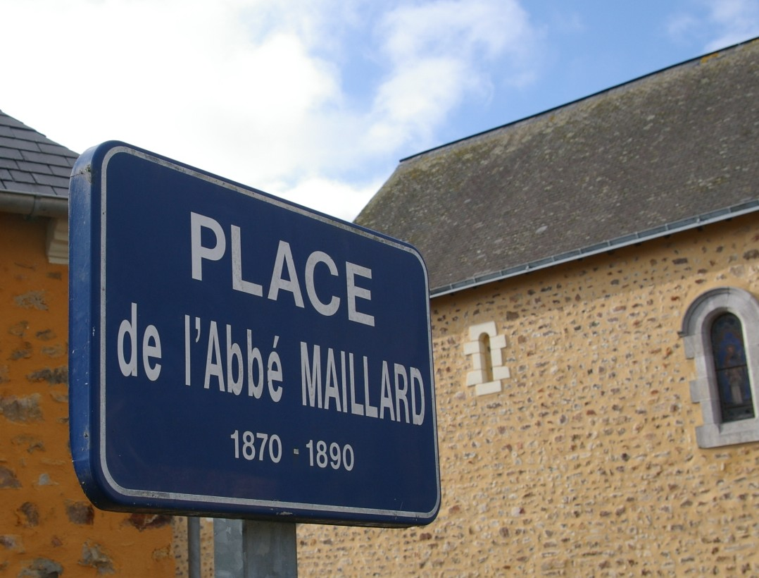 Place de l'abbé Maillard à Thorigné-en-Charnie (Mayenne, France). À droite l'un des vitraux donnés par lui à l'église de Thorigné.